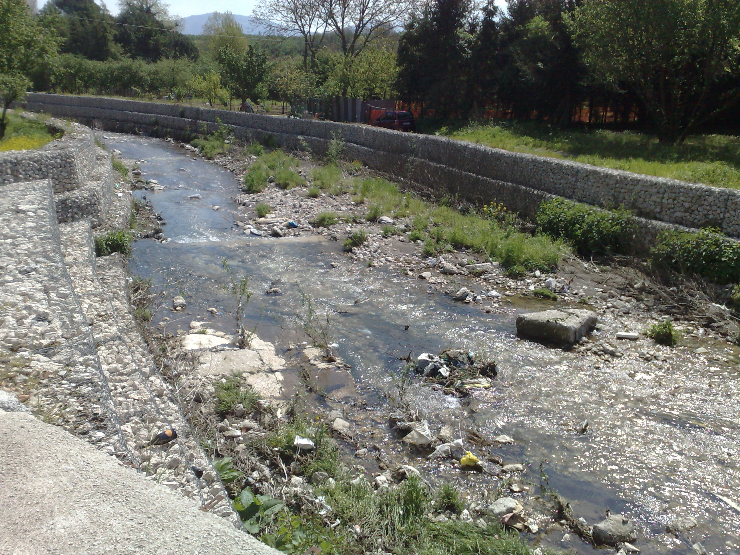 Ecco un altro scorcio del Fenestrelle,nella località in cui il fiume prendeva il nome di "Flumen Formata" ,in quanto era incanalato per servire il Mulino dell'Infornata(nome derivante appunto da "formis",canale in latino)